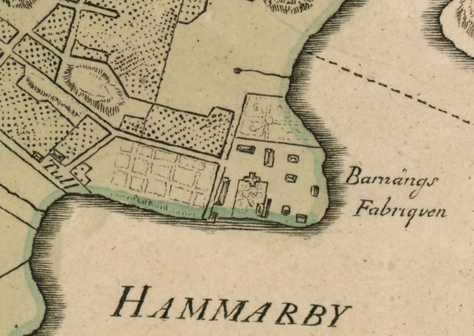 Barnängens fabriker vid Hammarbysjö i Södermalm